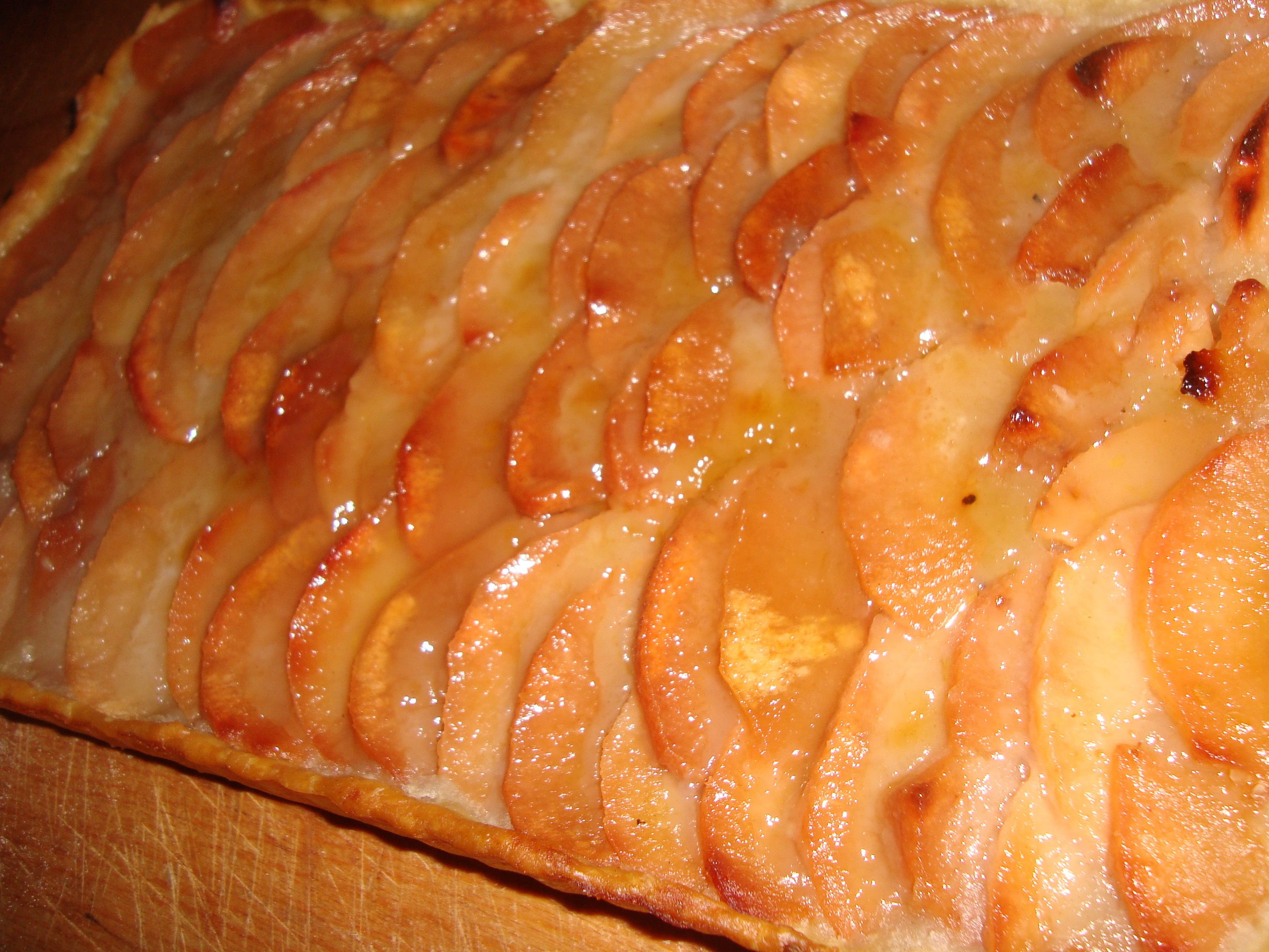 Coca de membrillos